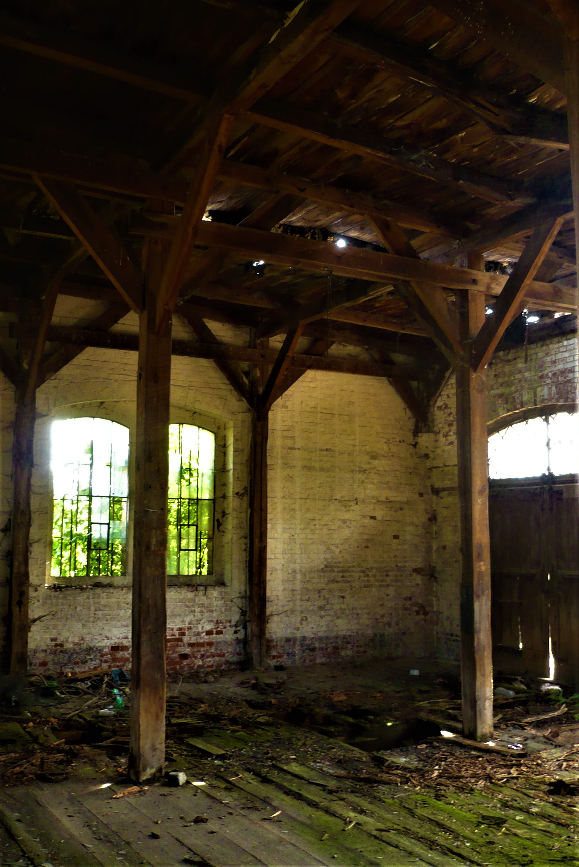 Gorzuchów - kolejowy przystanek osobowy Gorzuchów Kłodzki